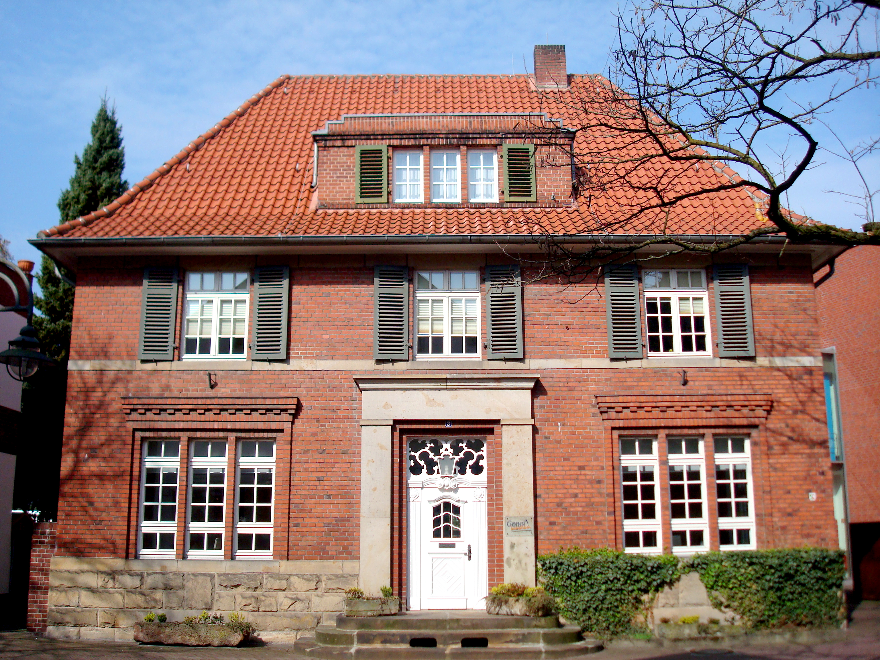 Alte Volksbank, heute Geno Immobilien, Gütersloh This is a photograph of an architectural monument. 096